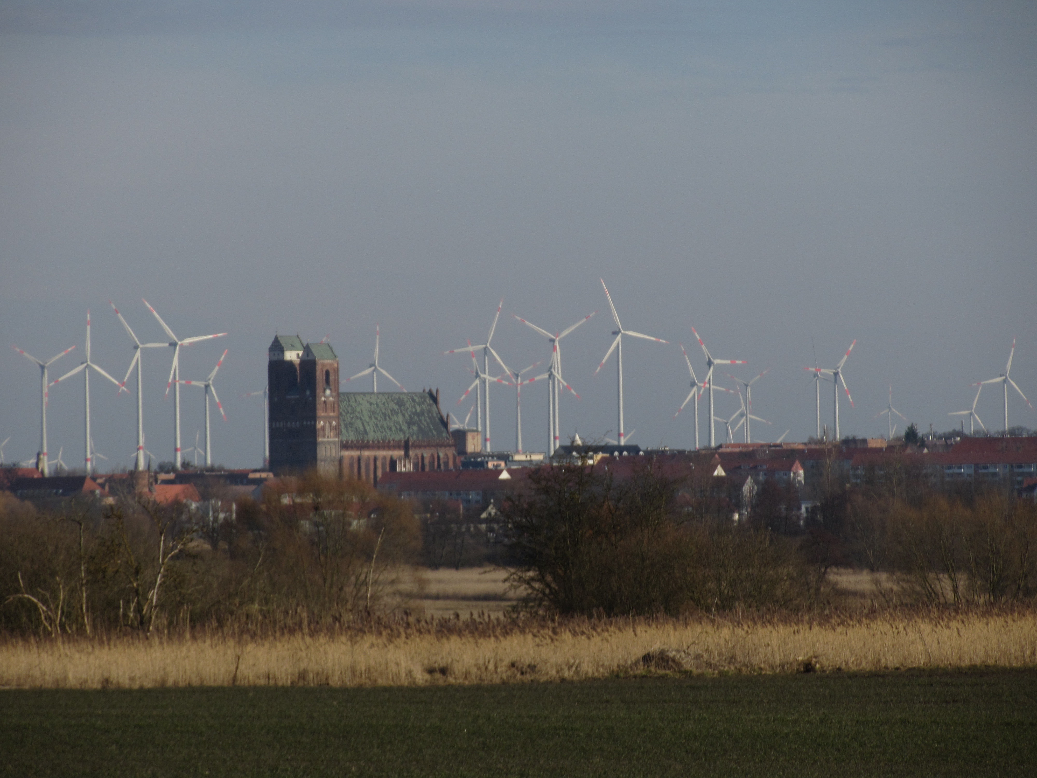 Vor den Toren von Prenzlau - Geschichte trifft Zukunft: erneuerbare Energien für die Gegenwart - Turm der Prenzlauer Marienkirche (St. Marien) aus dem 14. Jahrhundert vor Türmen von Windkraftanlagen aus dem 21. Jahrhundert